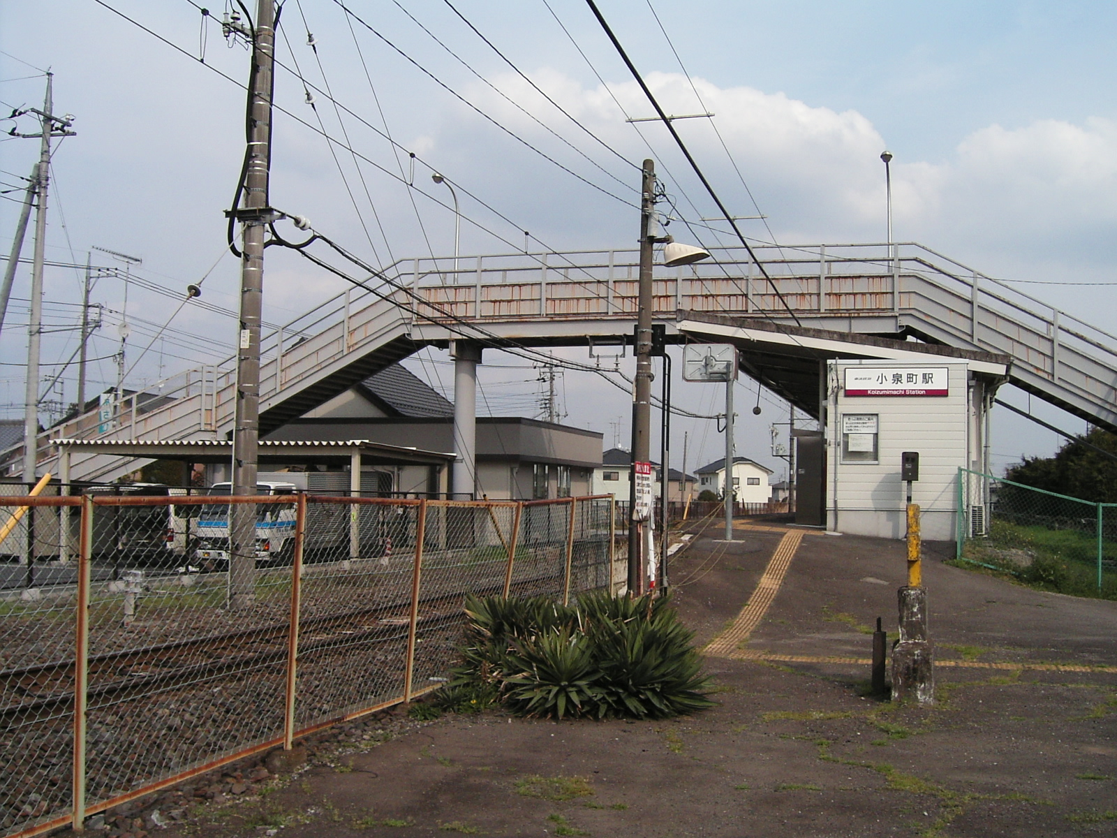 Koizumimachi station in Oizumi, Gunma pref, Japan 小泉町駅（東武小泉線）